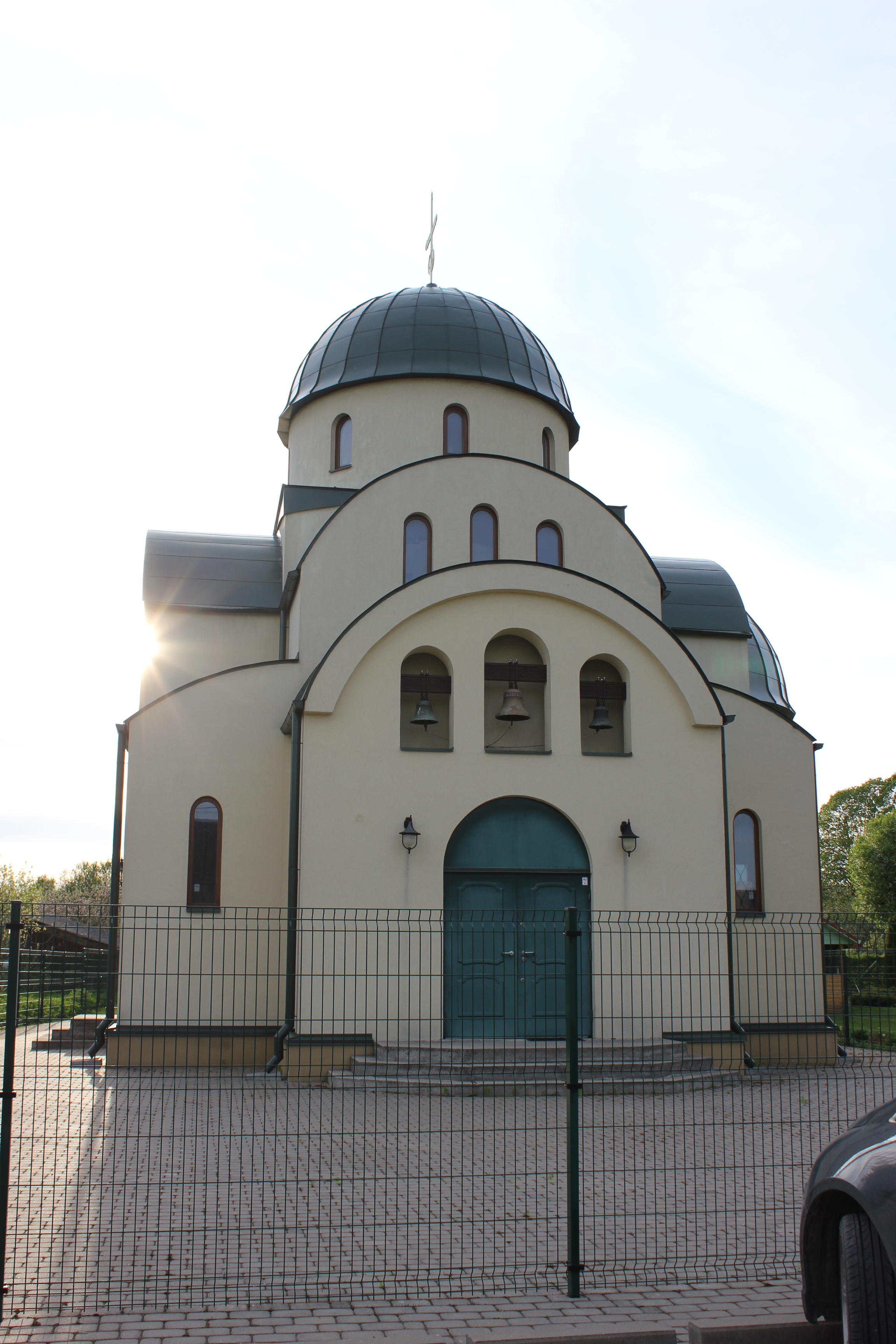 Türi õigeusu kiriku uus hoone, mis valmis 2013. aastal.